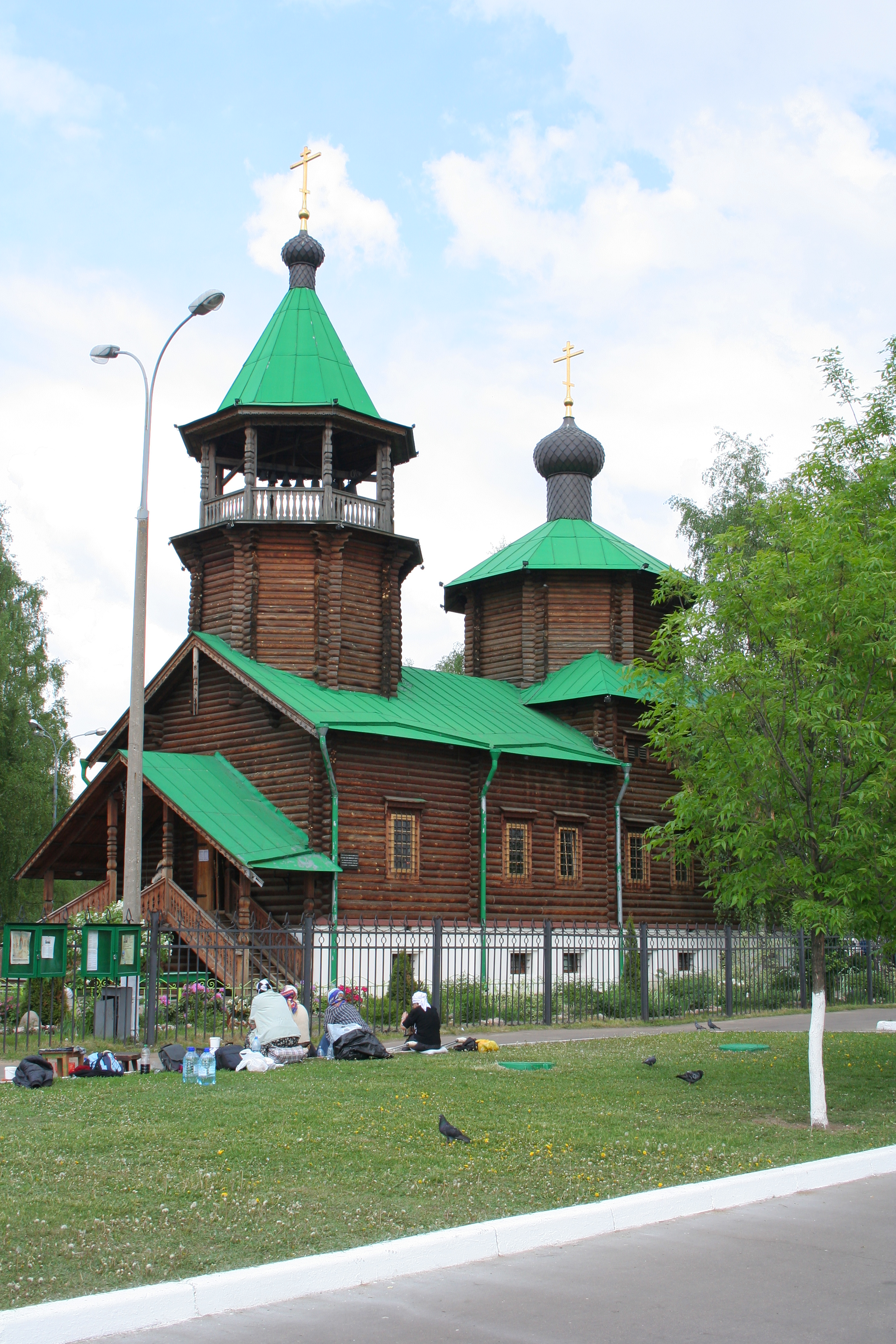 Kirche des Seligen Johannes von Kronstadt zu Schulebino, Moskau